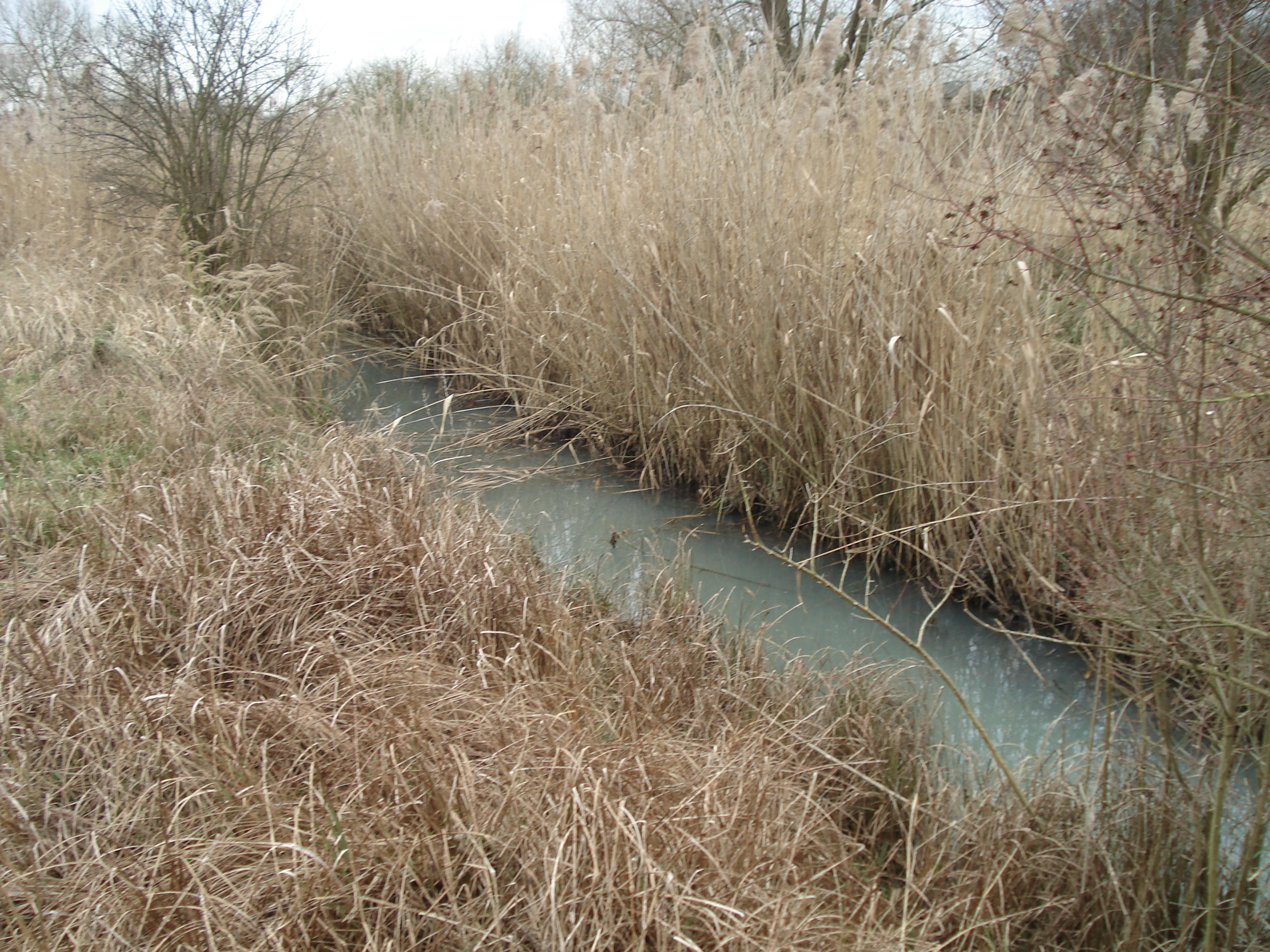 Der Bachquellengraben, bevor er in den Forchbach mündet